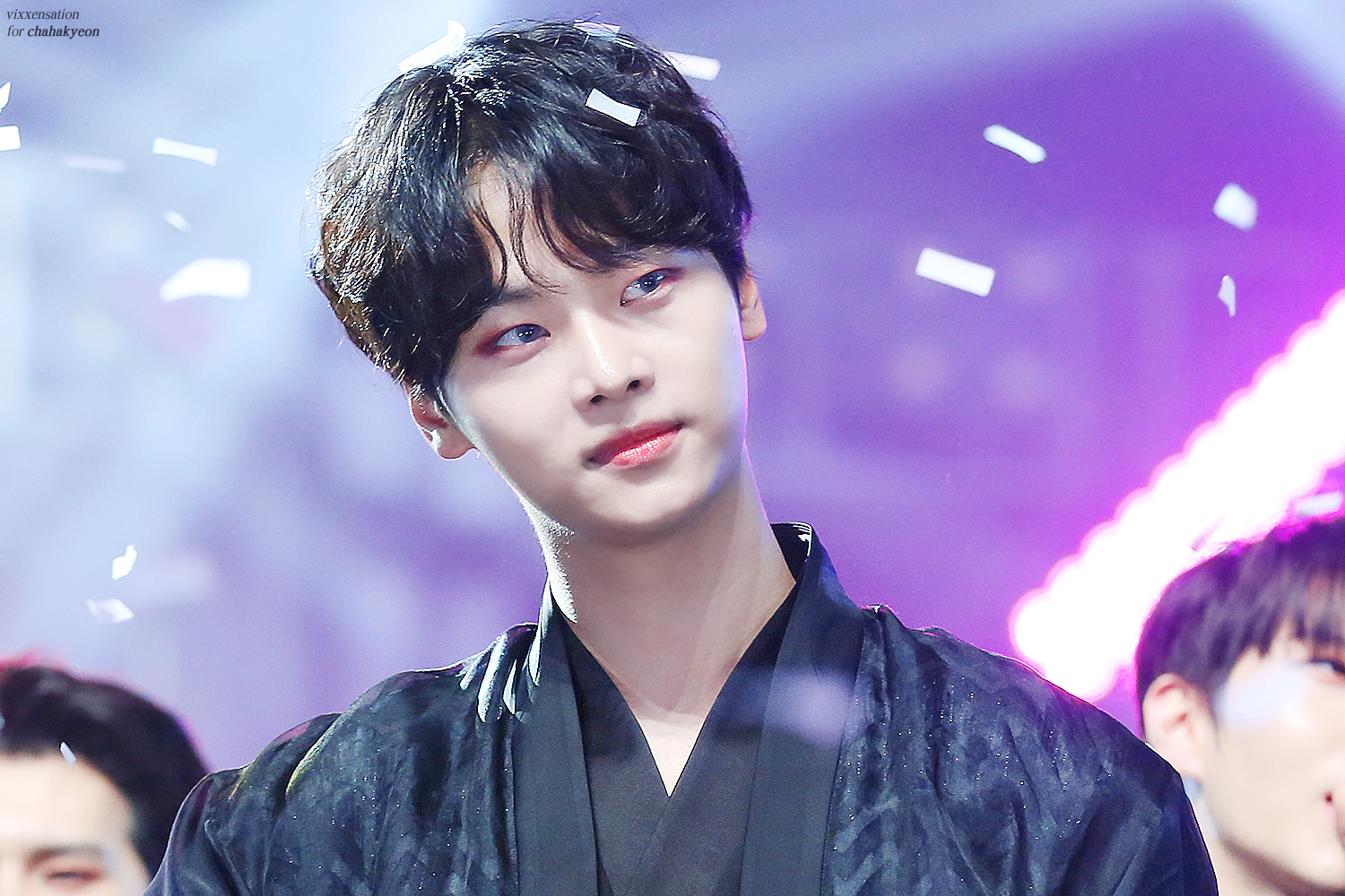 171231-180101 MBC 가요대제전